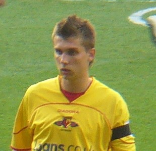 Tamas Priskin